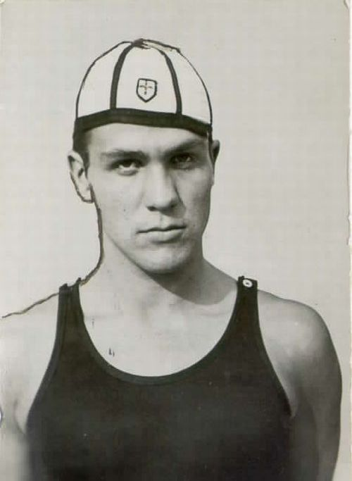 Draško Vilfan, Slovene swimmer.